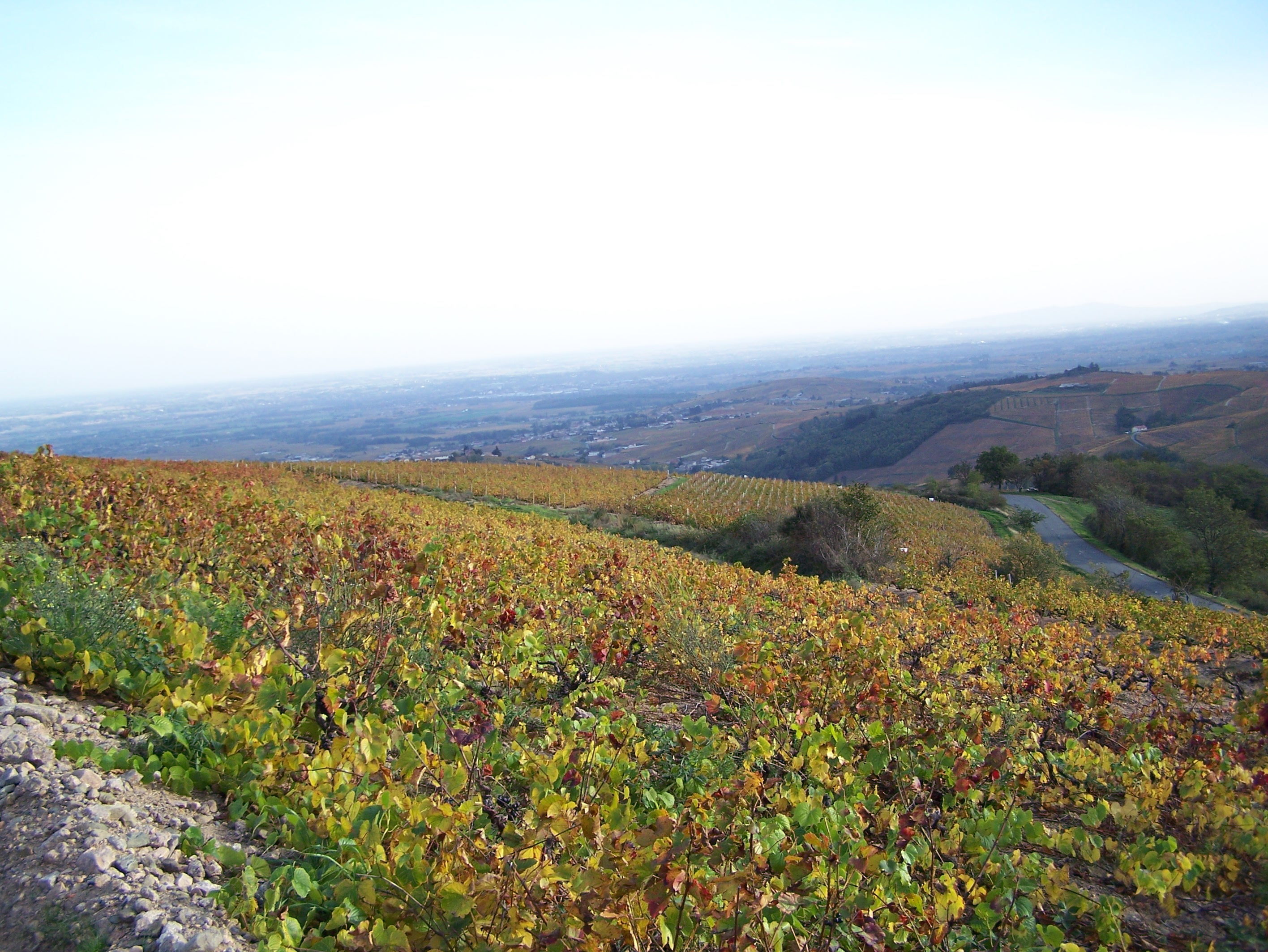 Vignes à l'automne au niveau du col de Durbize à Beaujeu dans le département du Rhône.